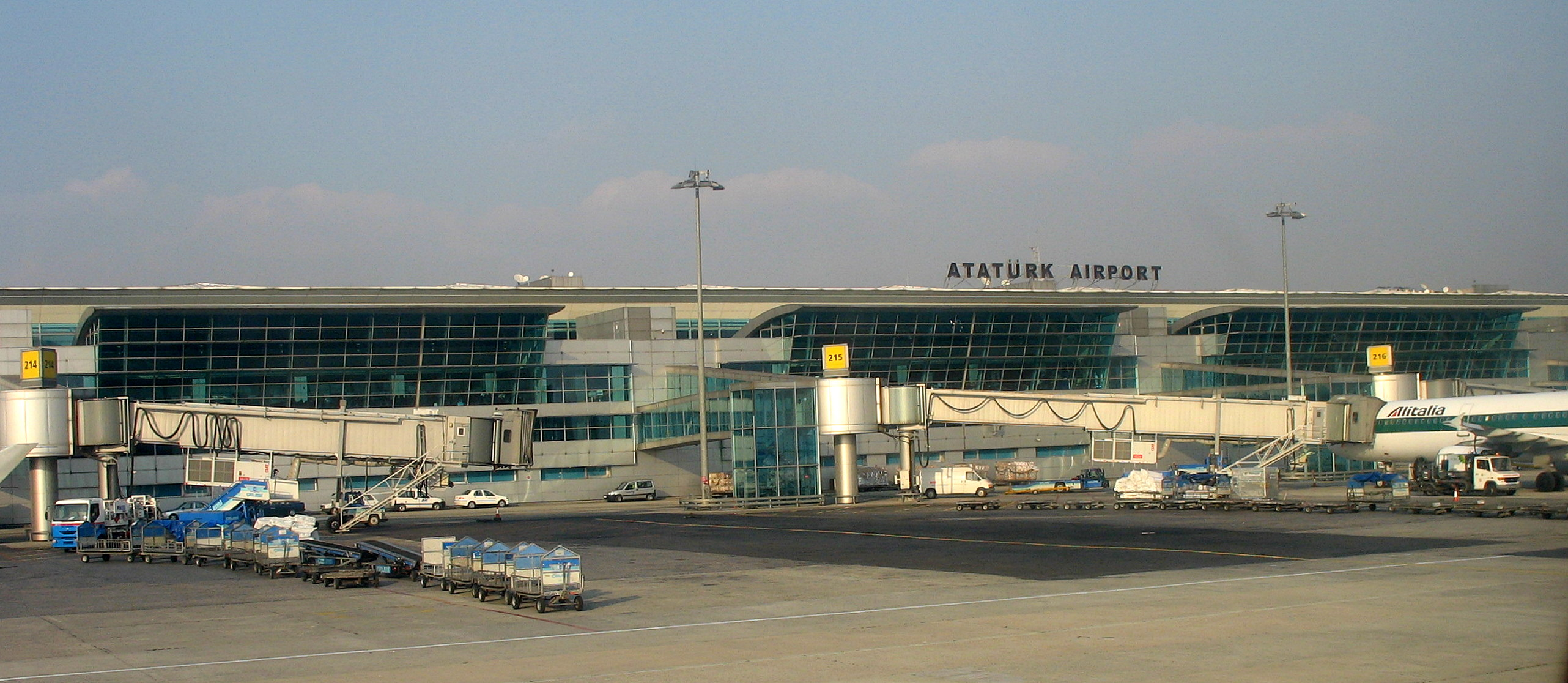 Ataturk Havalimani